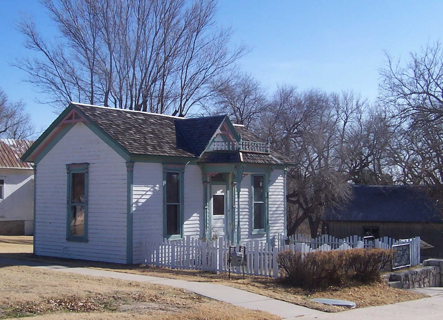 Dalton Gang House, Meade, Kansas